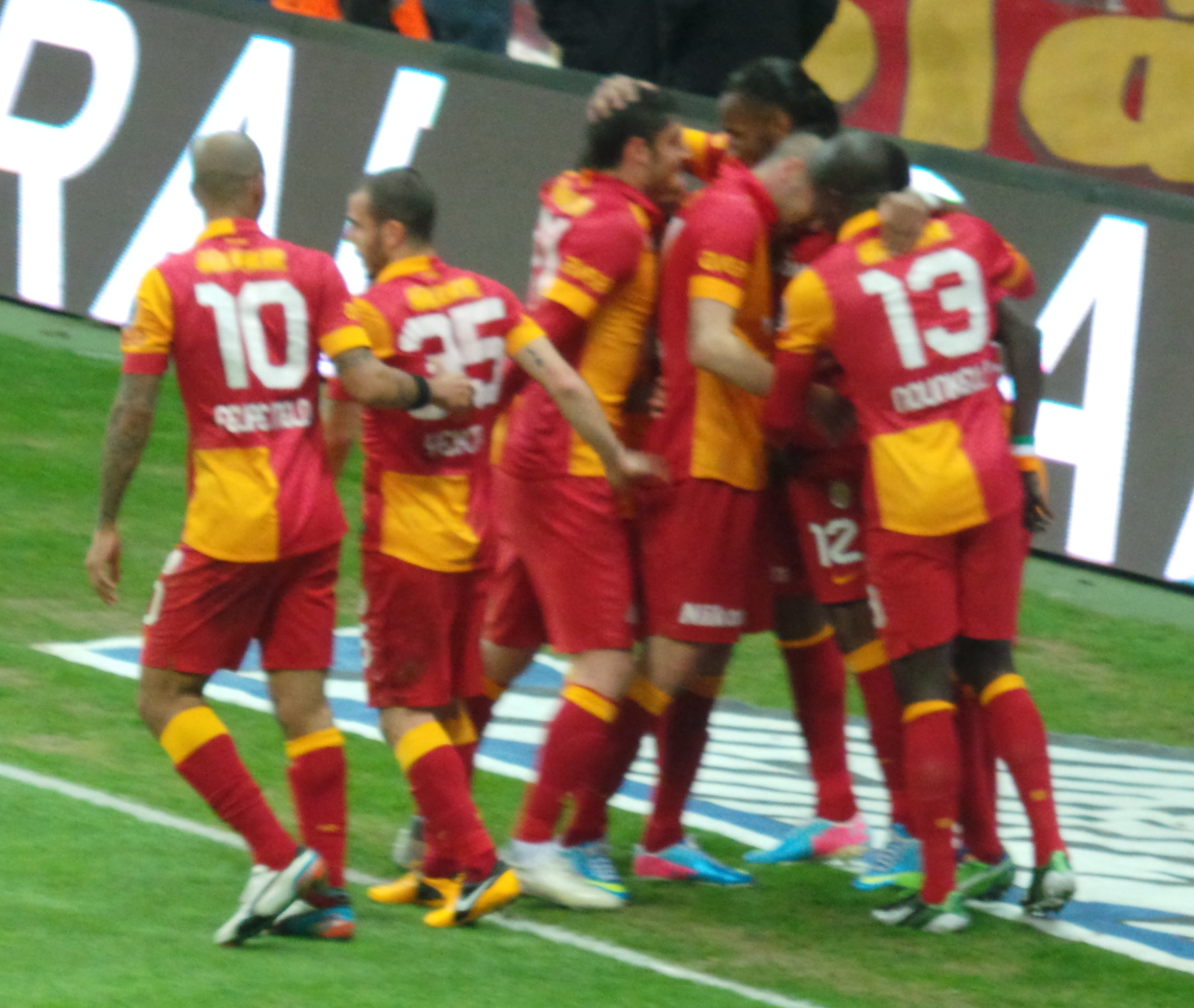 Drogba Türk Telekom Arena'da atılan 100.golü kaydettikten sonra.